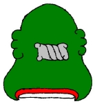 Glifo Náhuatl del municipio de Tezontepec de Aldama, Hidalgo